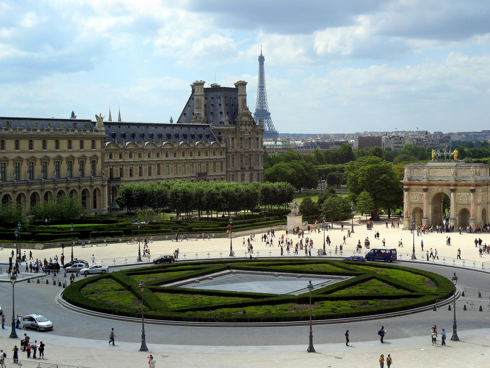 Place du Carrousel à Paris. Sur la photographie apparaissent la pyramide inversée du Louvre, la tour Eiffel, l'arc de triomphe du Carrousel et l'aile de Flore du palais du Louvre.